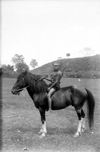 Negatief. Balinees jongetje te paard